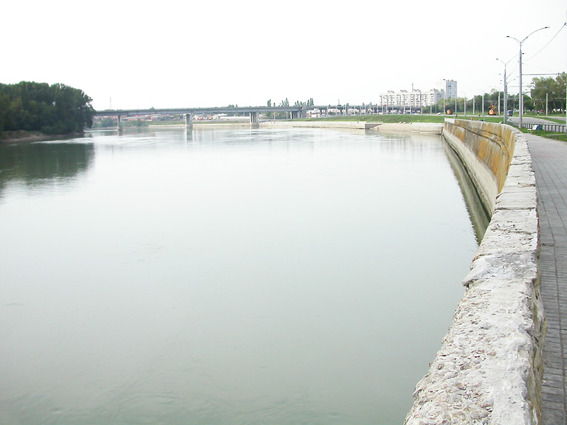 Kuban river in Krasnodar